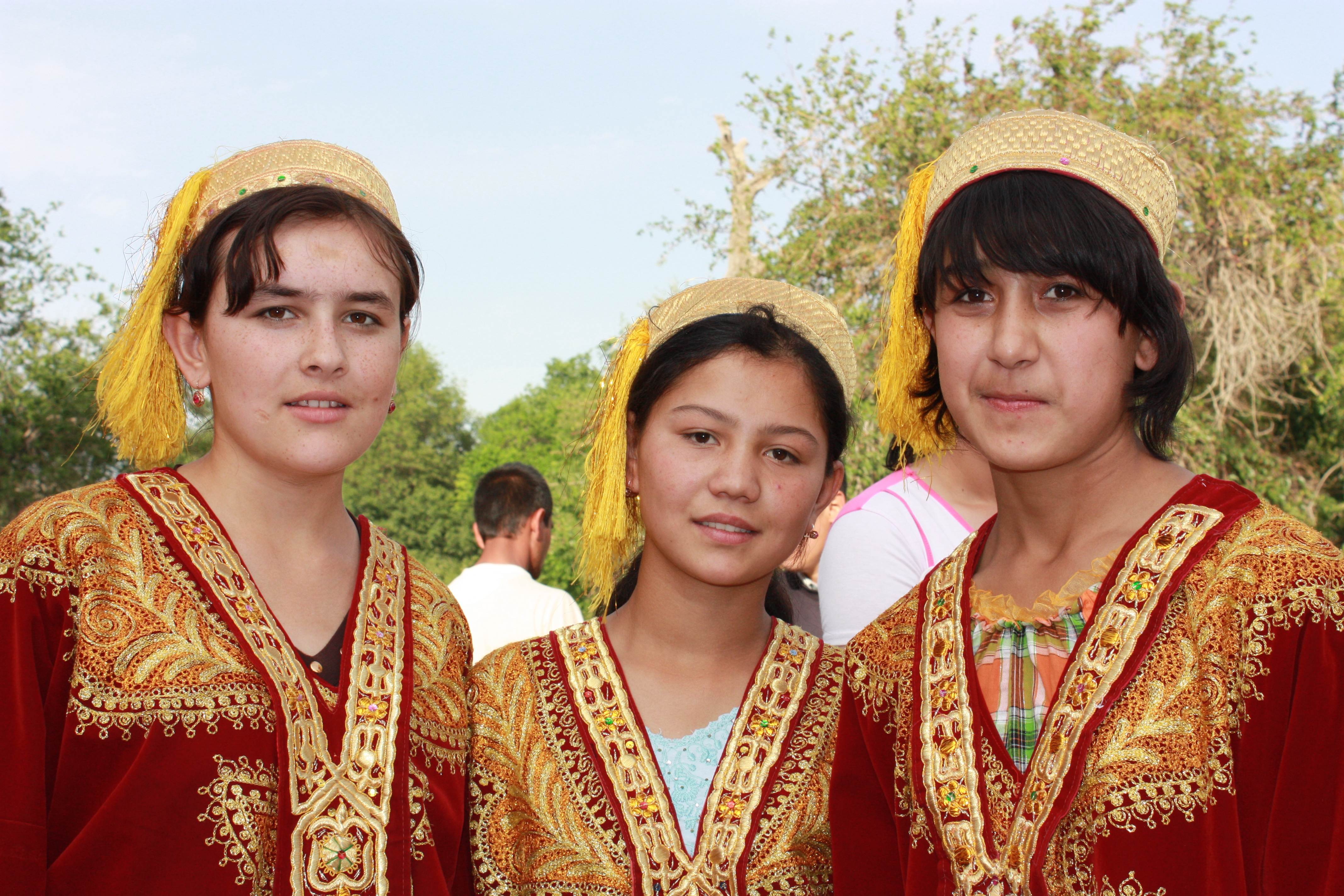 Bukhara, Silk & Spice festival